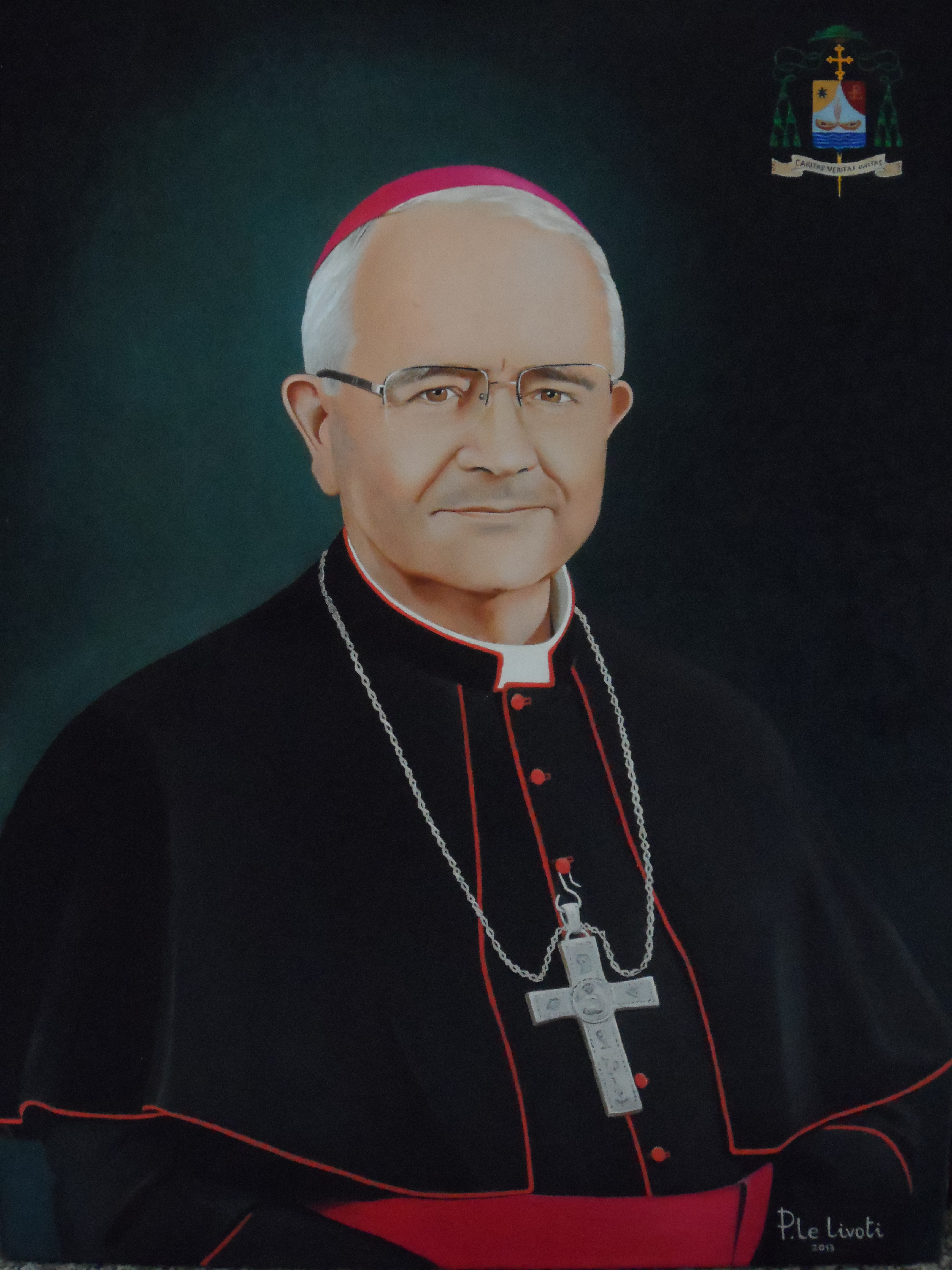 Olio su tela